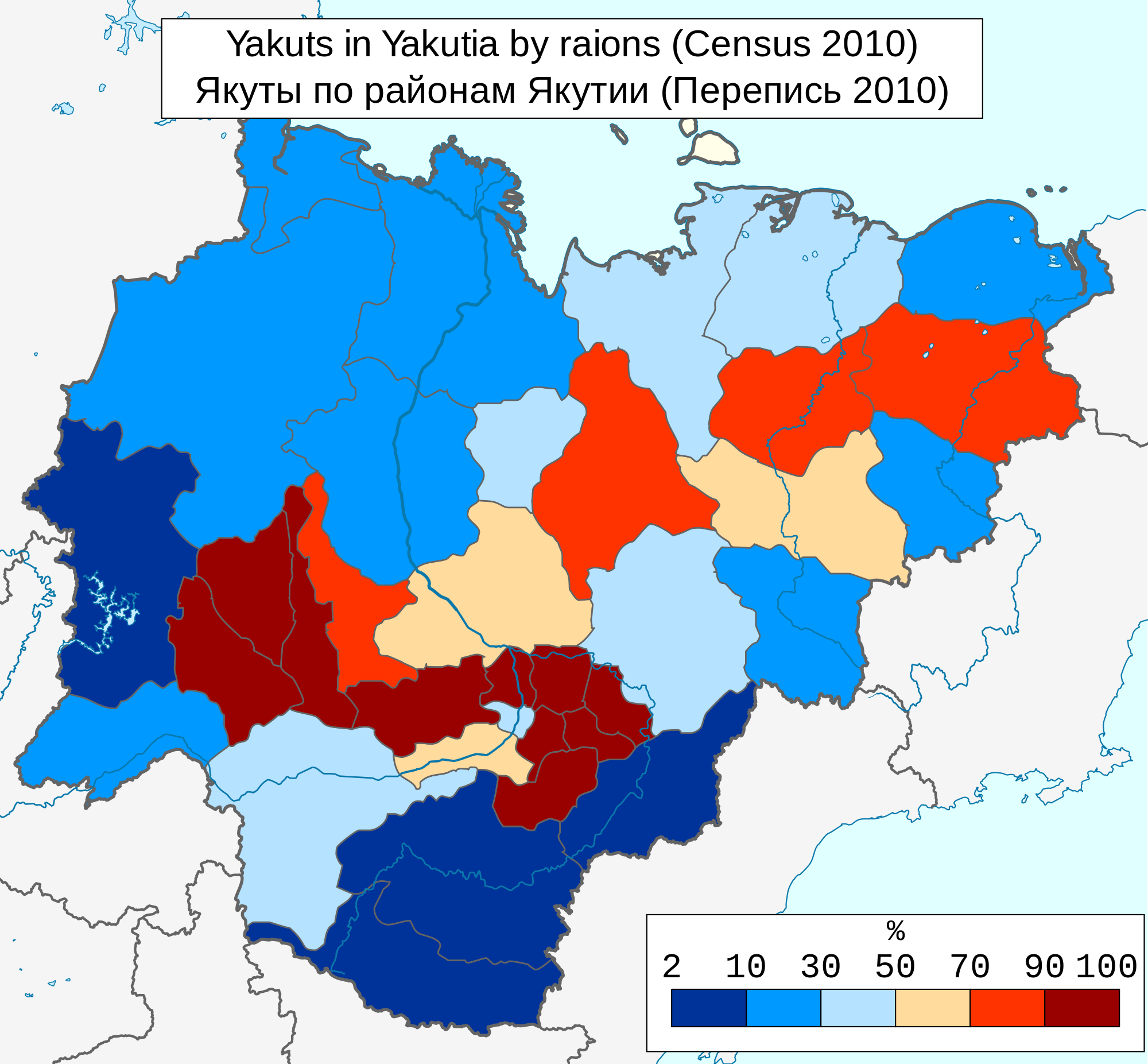 ტერიტორია , სადაც ცხოვრობდნენ იაკუტები